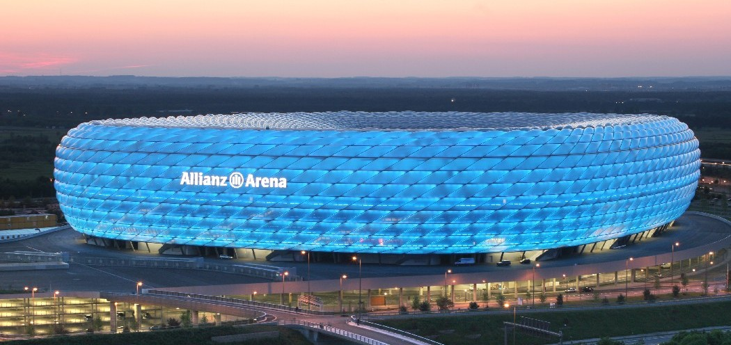 (no longer available)